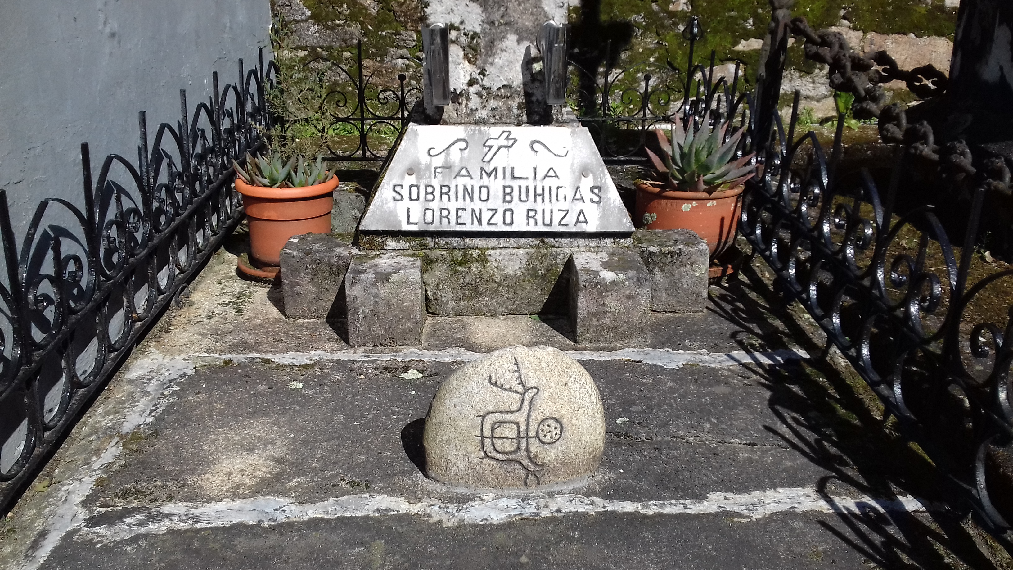 Lápida da familia Sobrino Buhigas - Lorenzo Ruza